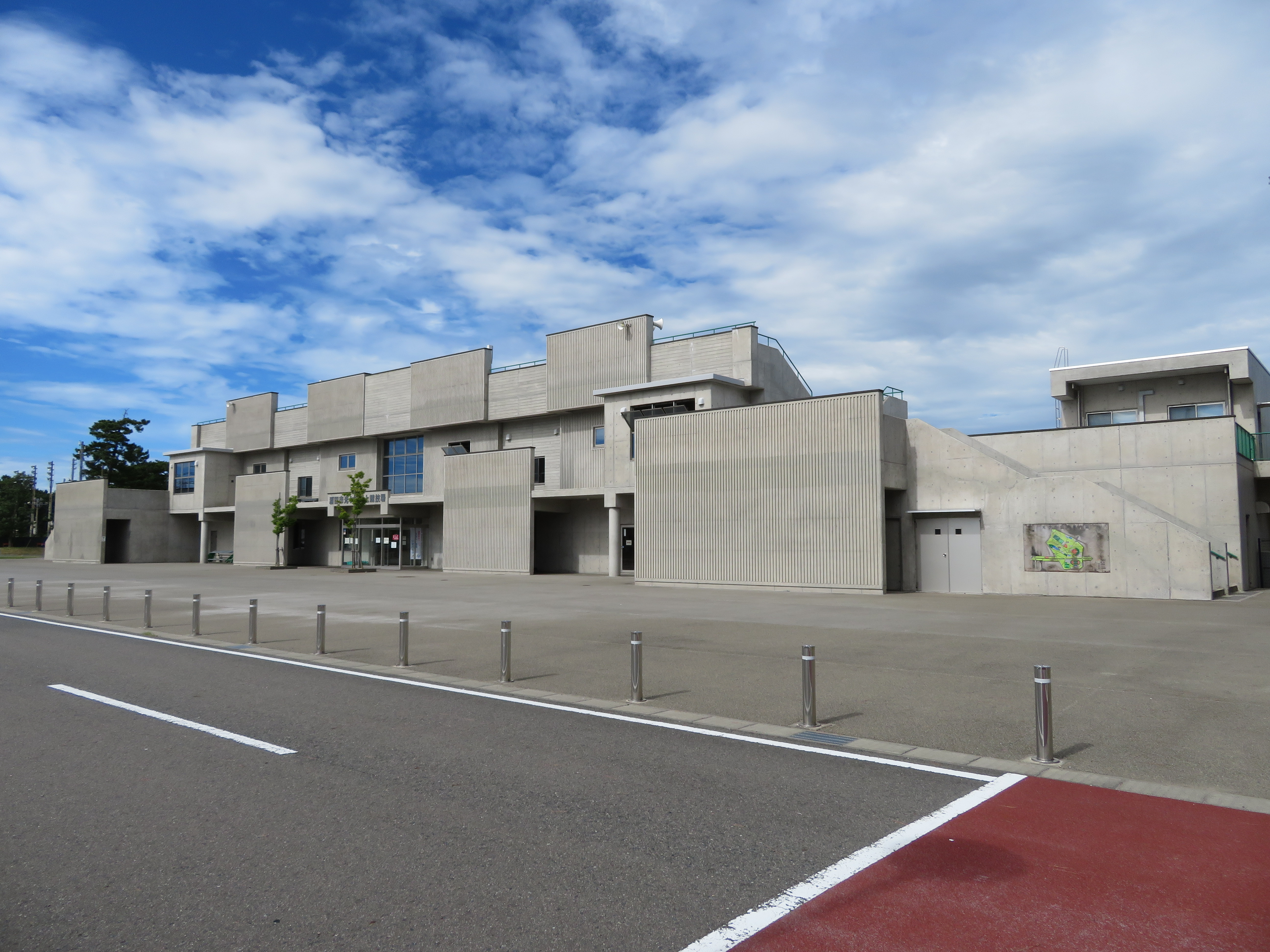 酒田市光ヶ丘陸上競技場 Canon PowerShot SX720 HS